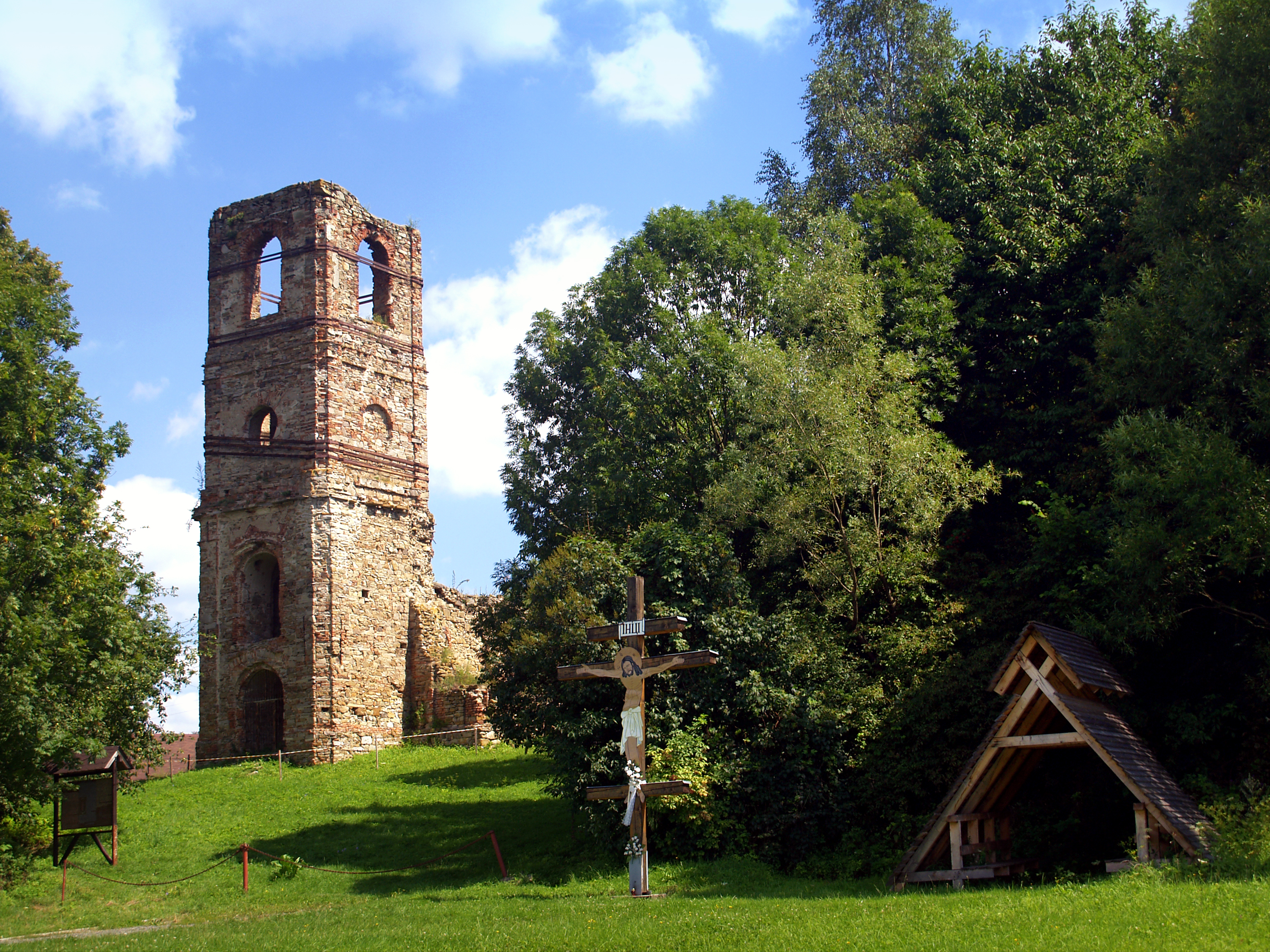 Krásny Brod, Prešov (Slovaquie) - Les ruines du monastère basilien de la Descente de l'Esprit saint. Vue depuis côté route 559